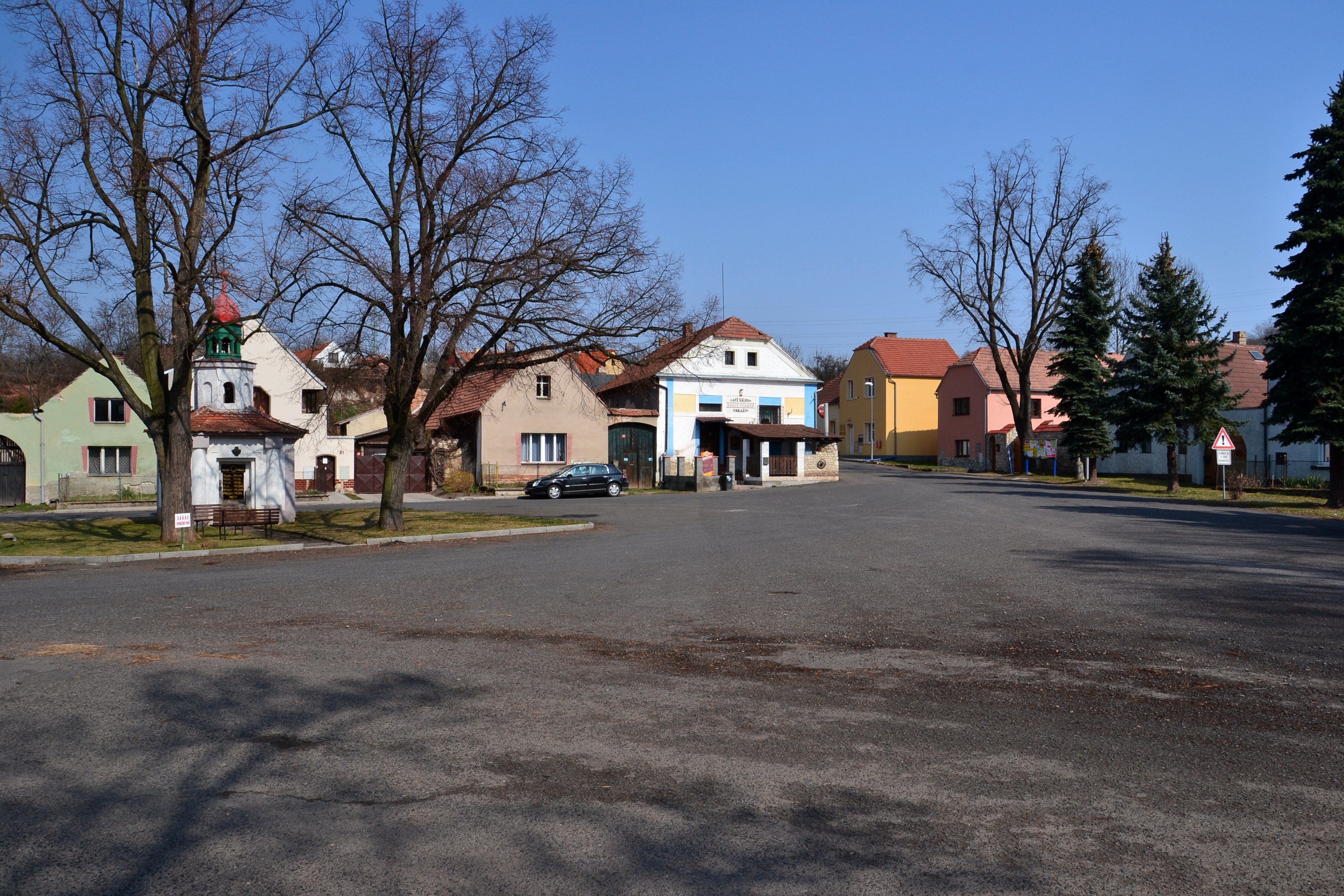 Zbrašín - náves